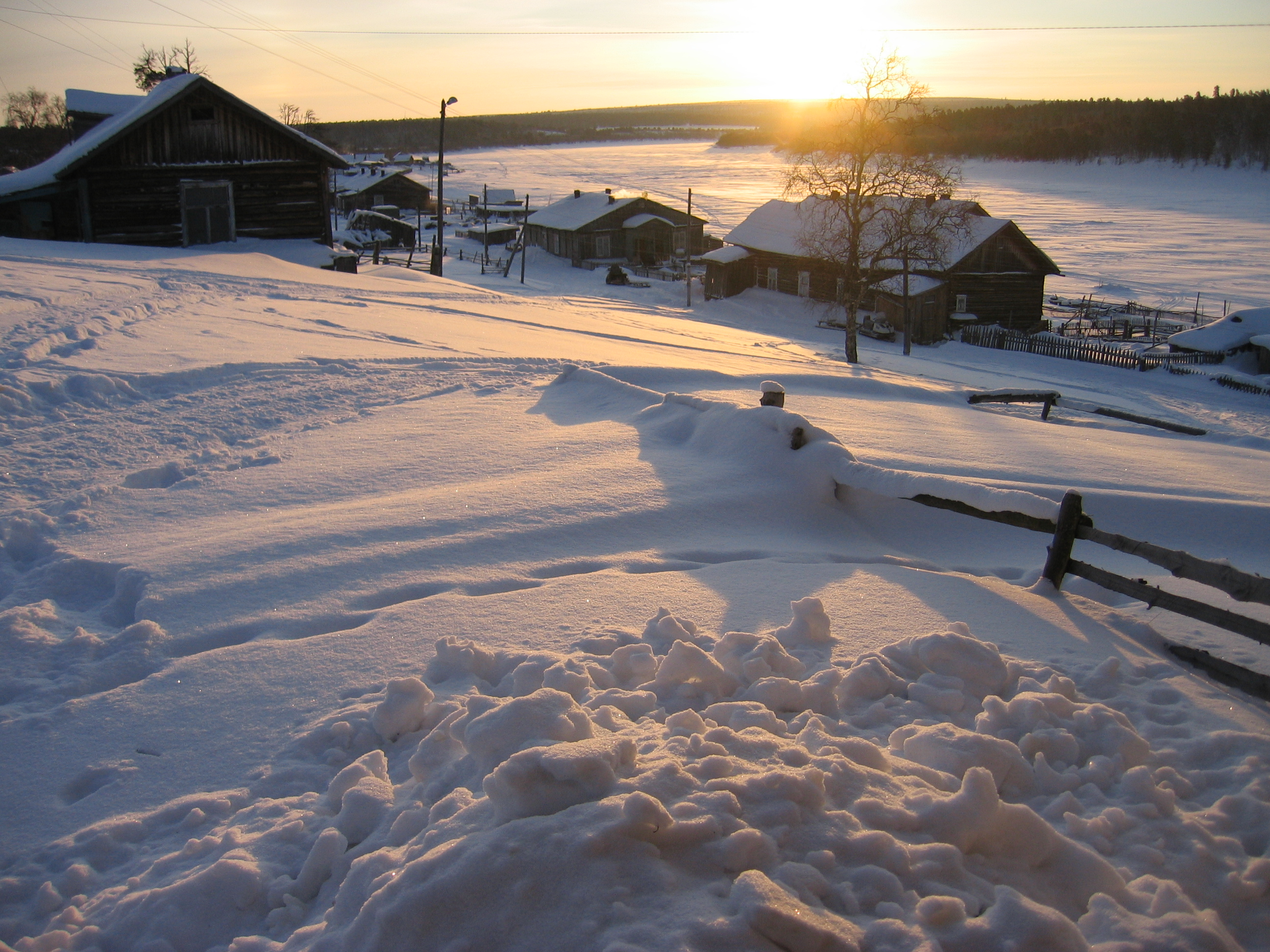 Село Каневка